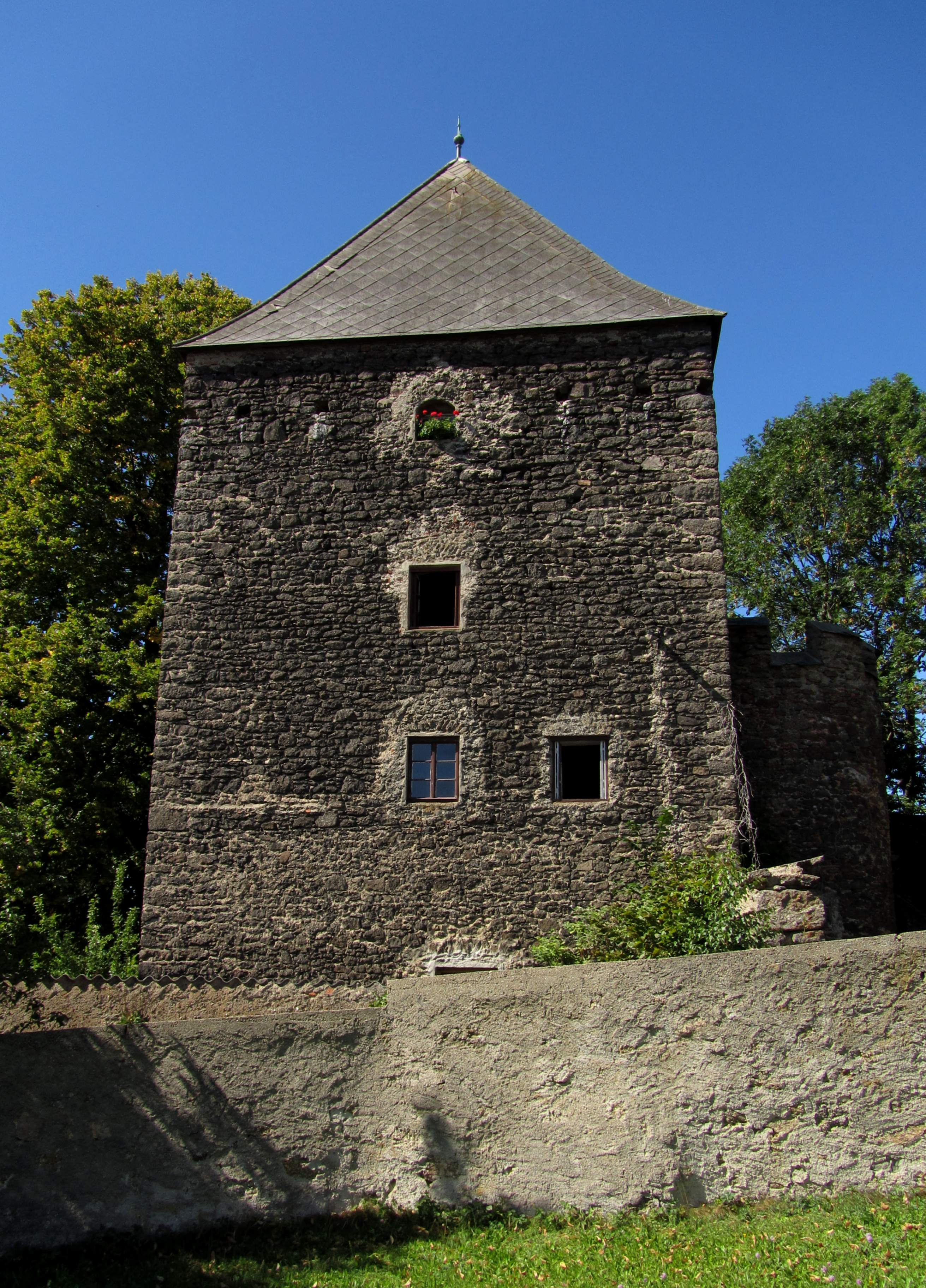 Kuenringerturm